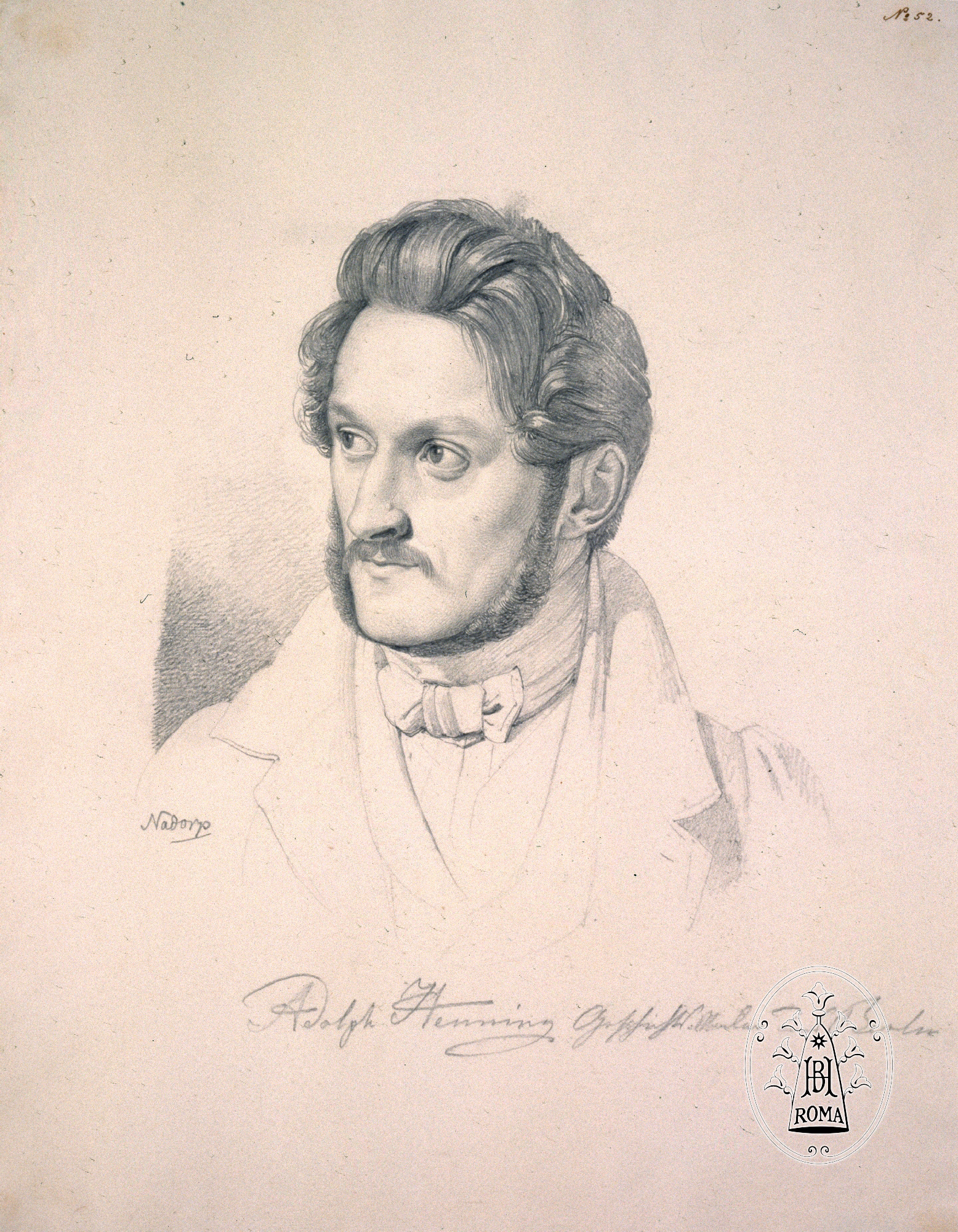 Porträt Adolf Henning, gezeichnet von Franz Johann Heinrich Nadorp, Rom um 1834